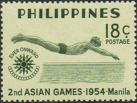 1954 Asian Games